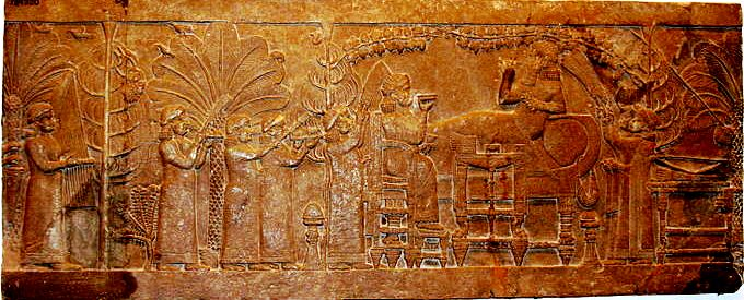 Rilievo assiro risalente al VII secolo a.C. rinvenuto nella parte settentrionale del Palazzo di Assurbanipal. Il rilievo, conservato presso il British Museum di Londra, mostra un ricevimento in un giardino attrezzato.